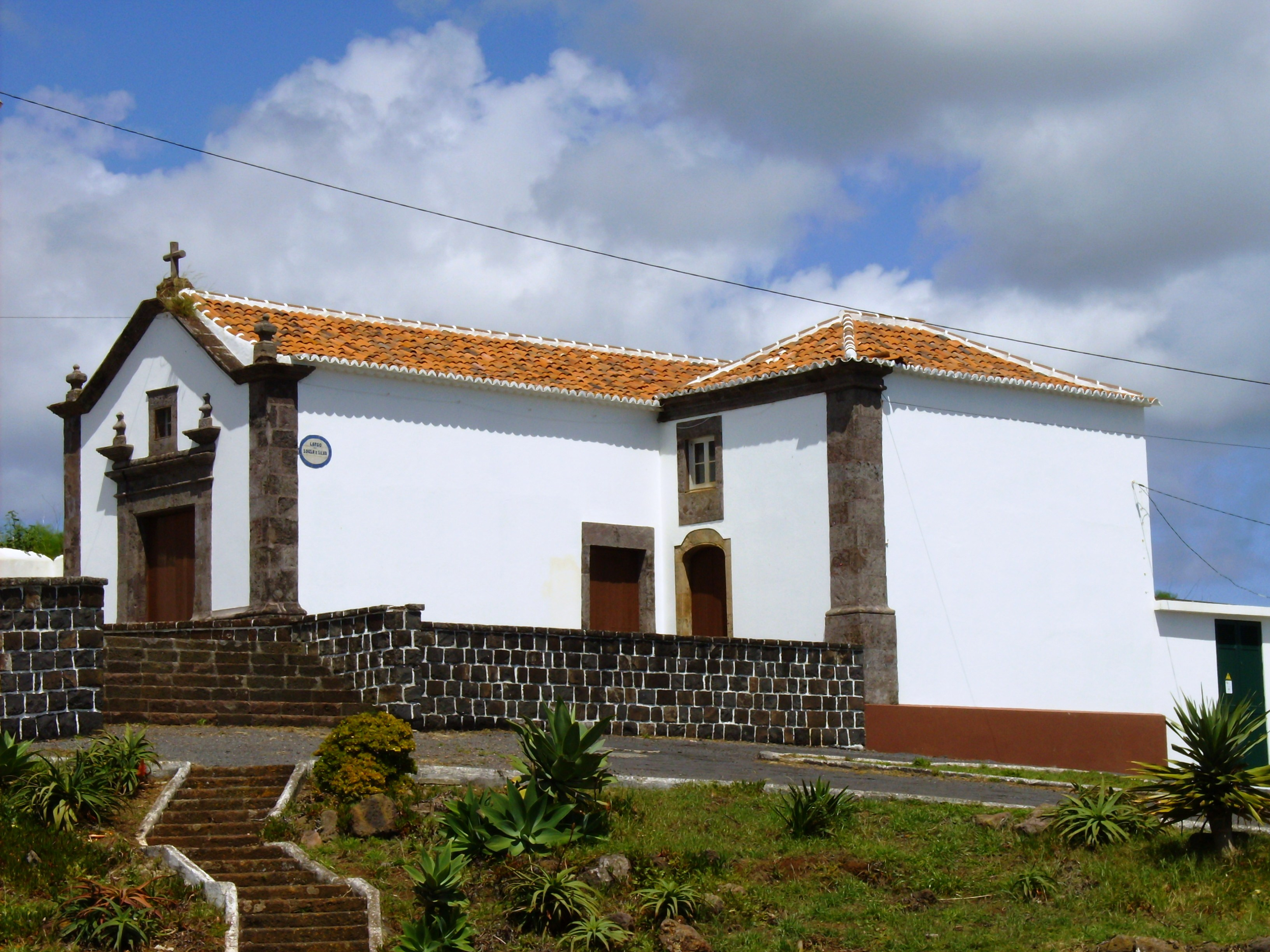 Ermida de São Pedro Gonçalves Telmo, Ilha de Santa Maria (Açores), Portugal.